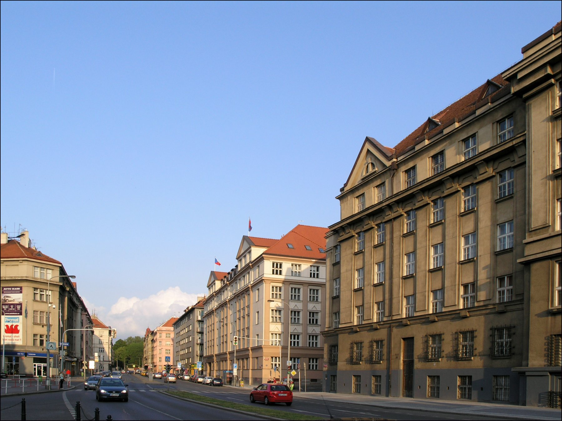 ulice Československé armády v Praze-Bubenči (pohled od Náměstí Svobody na východ)